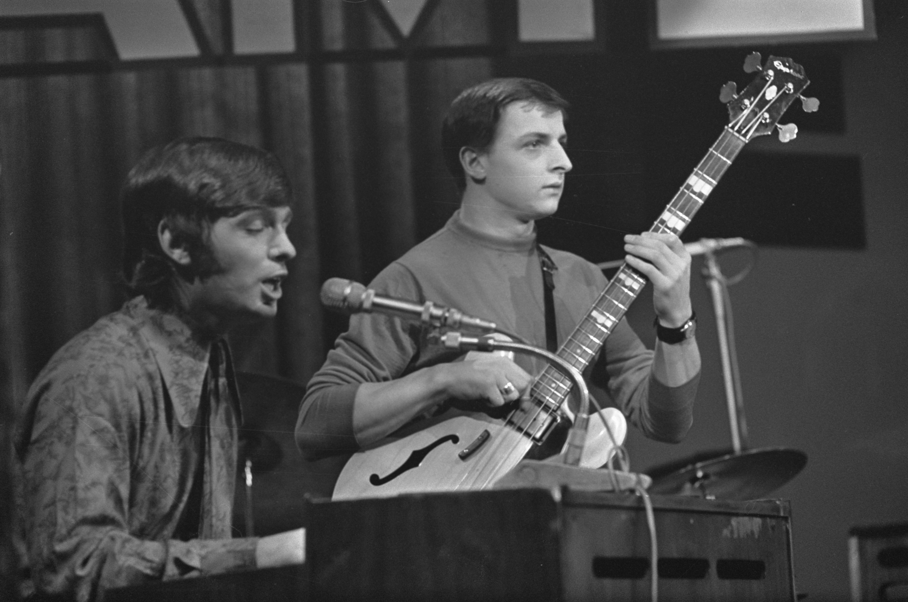 Grand Gala du Disque in het Concertgebouw te Amsterdam (?). Optreden van Georgie Fame, op bas Rick(y) (Fenson) Brown. Datum: 2 oktober 1966